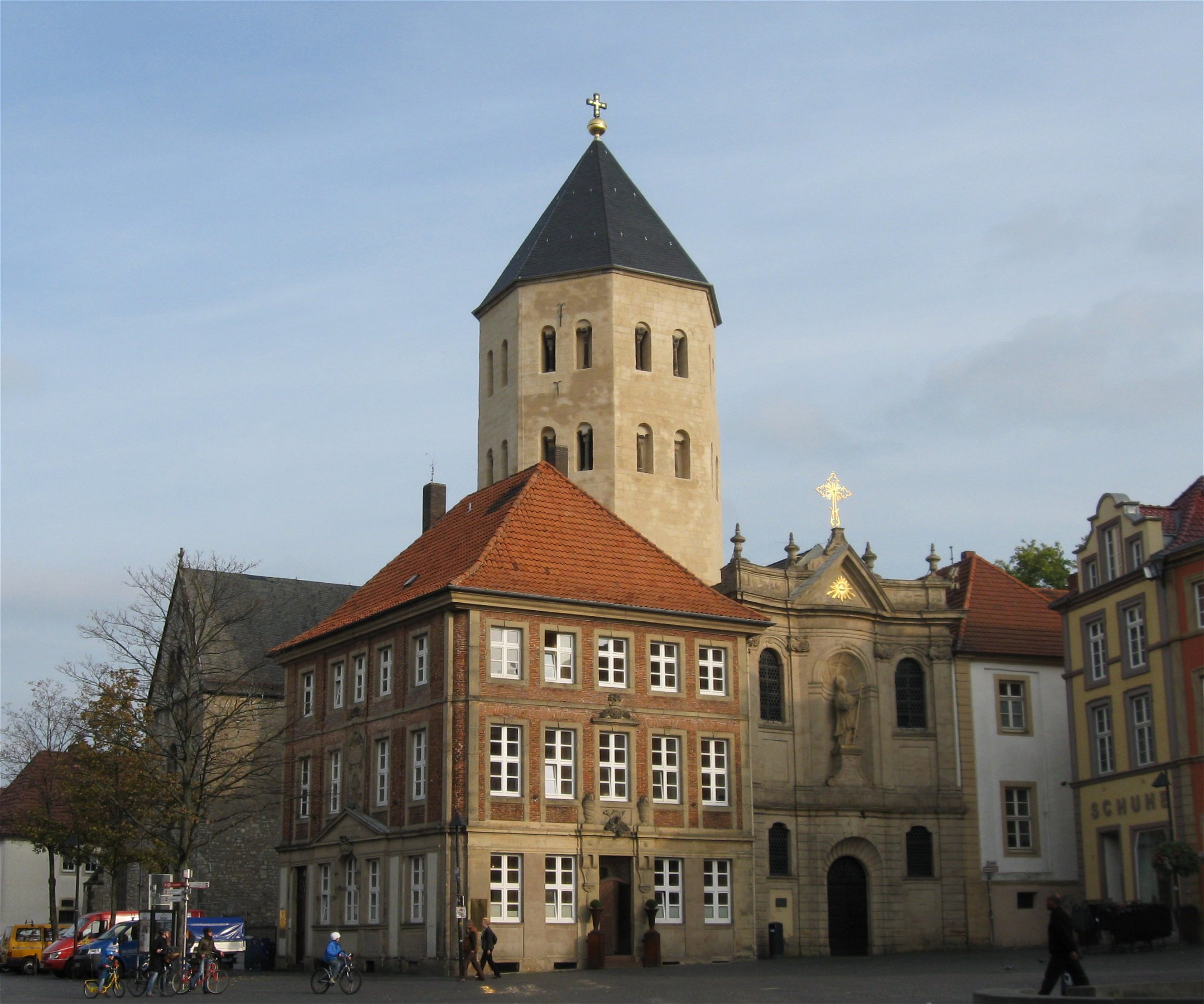 Gaukirche in Paderborn